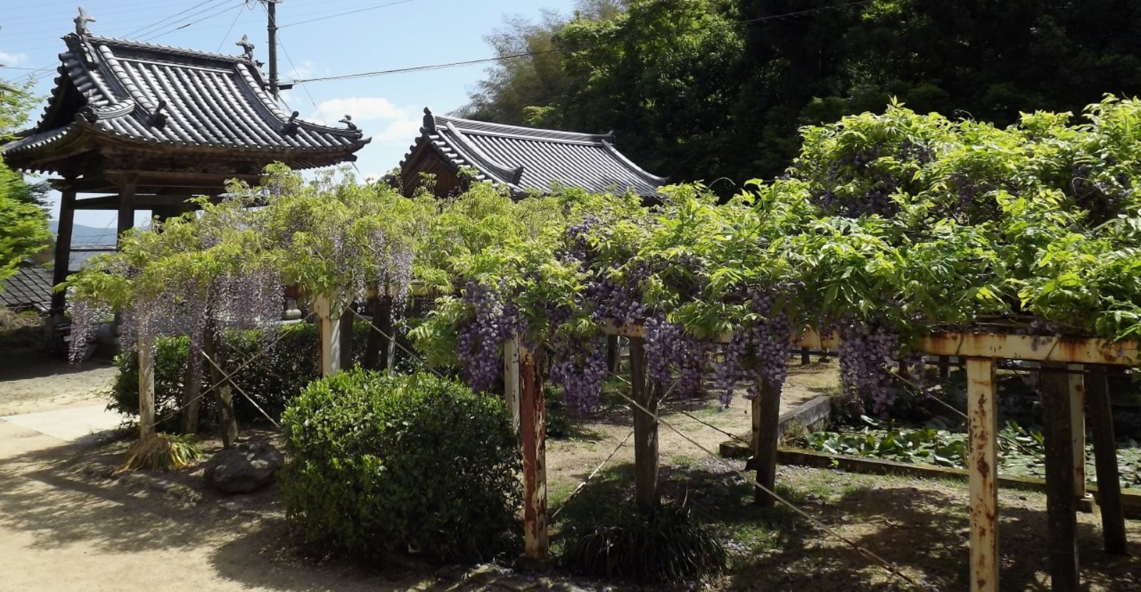 藤井寺のフジ棚